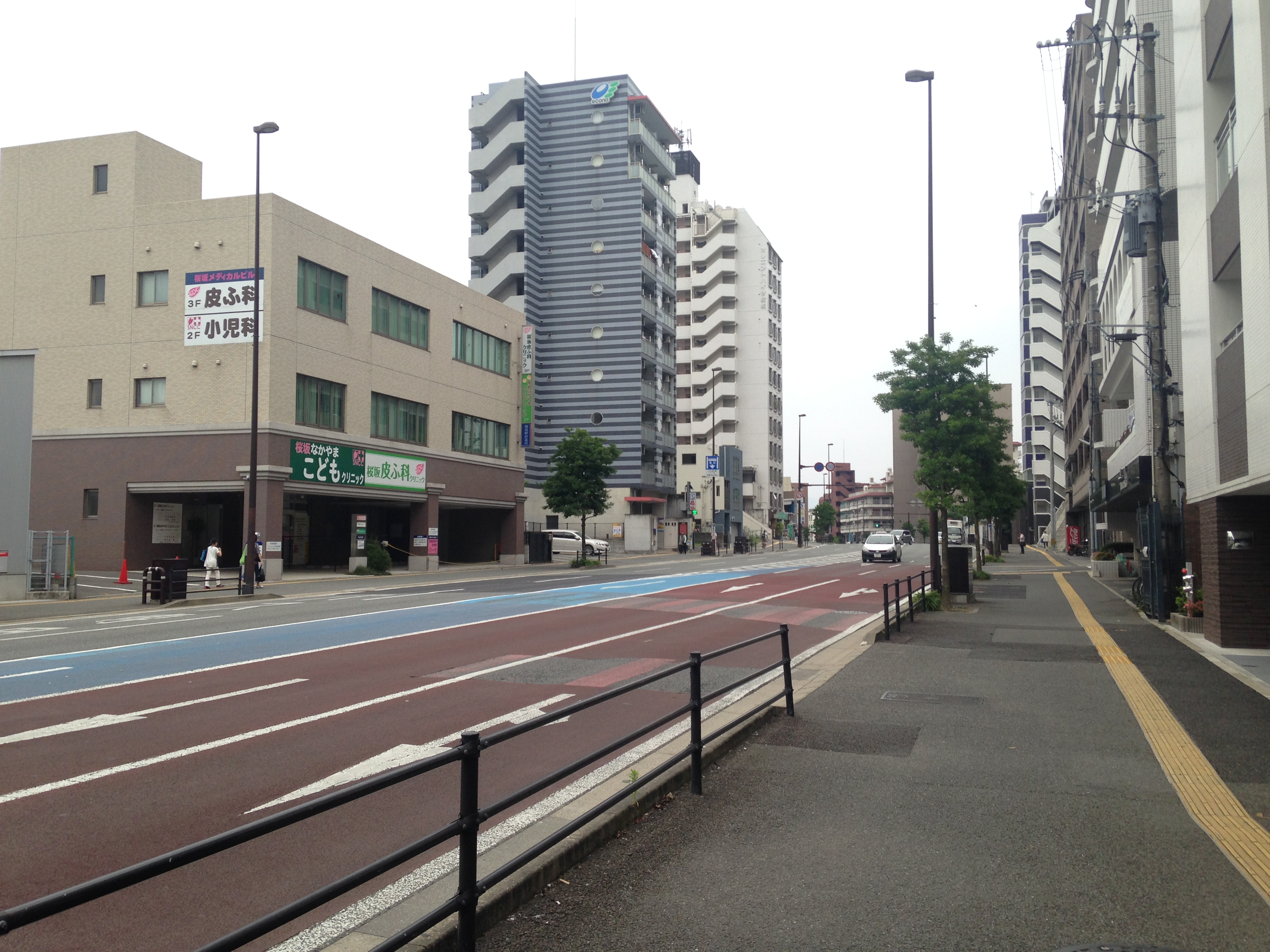 桜坂駅付近を通る城南線